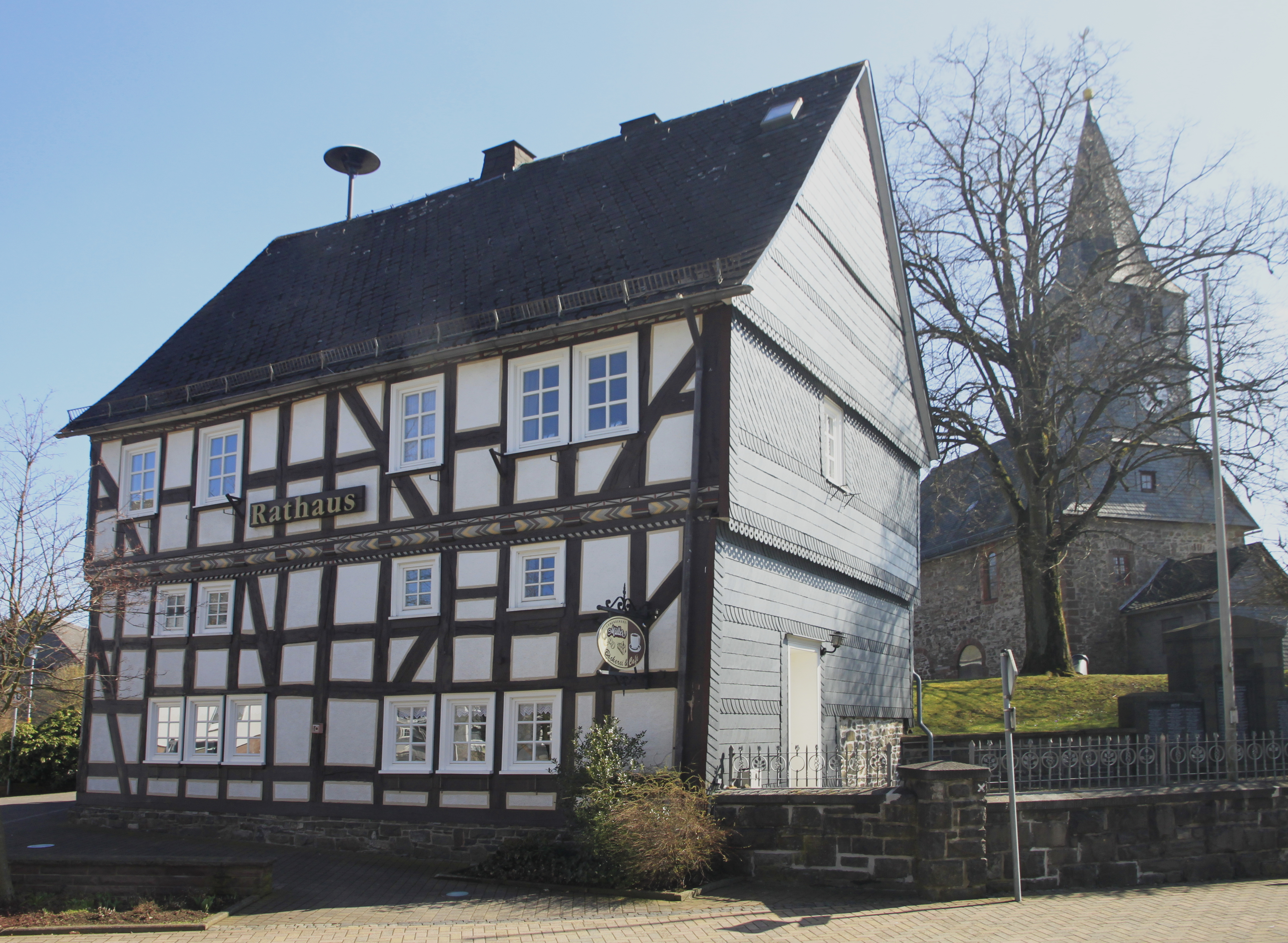 Rathaus und Evangelische Kirche in Bromskirchen (Hessen, Deutschland)